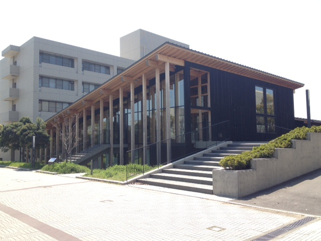 wadai ss